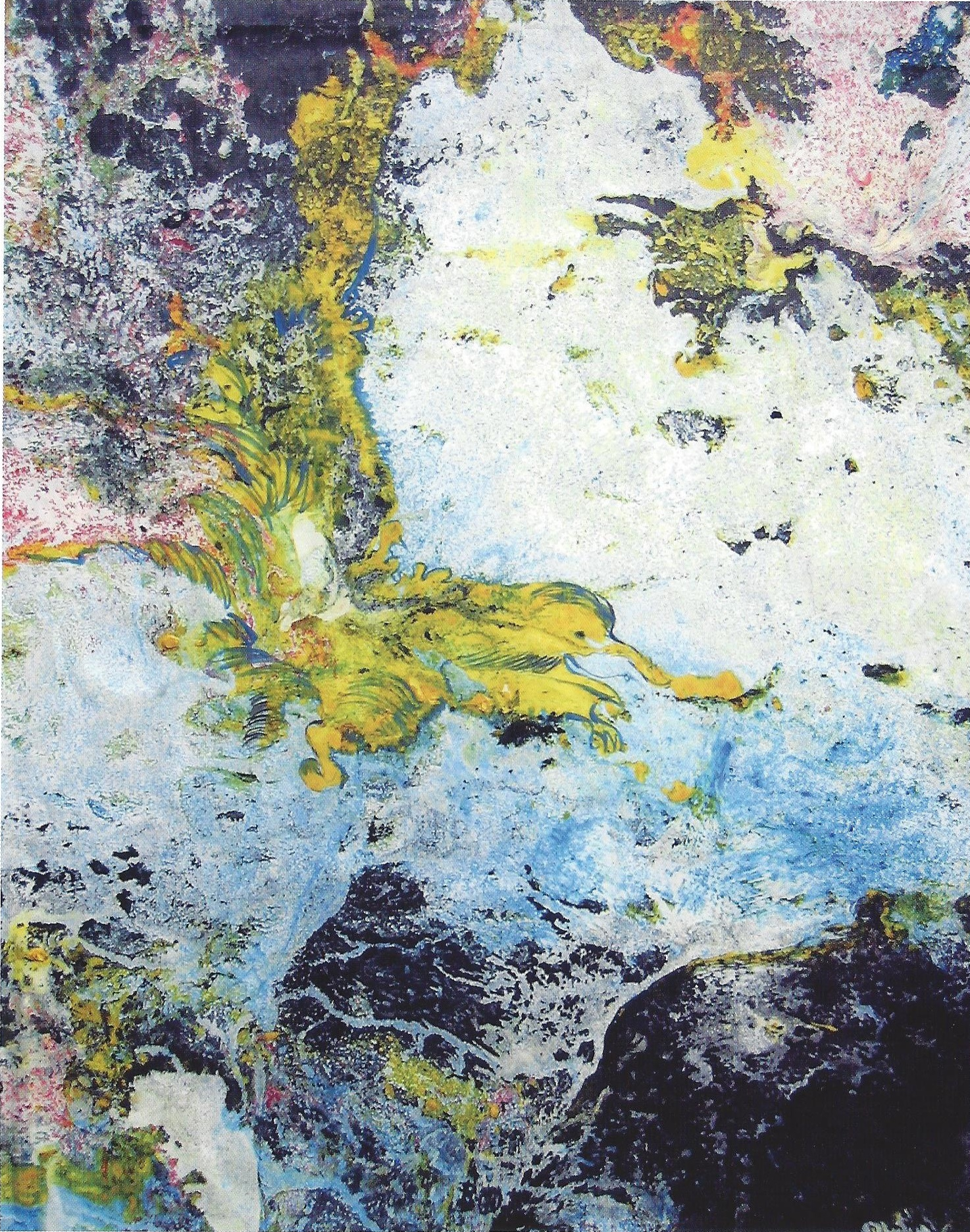 „Der Feuervogel“, Mischtechnik